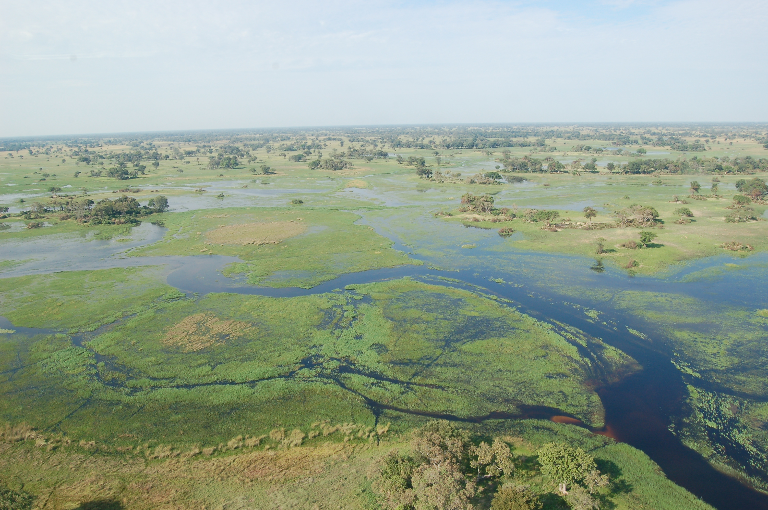 Okavango Delta, Botswana